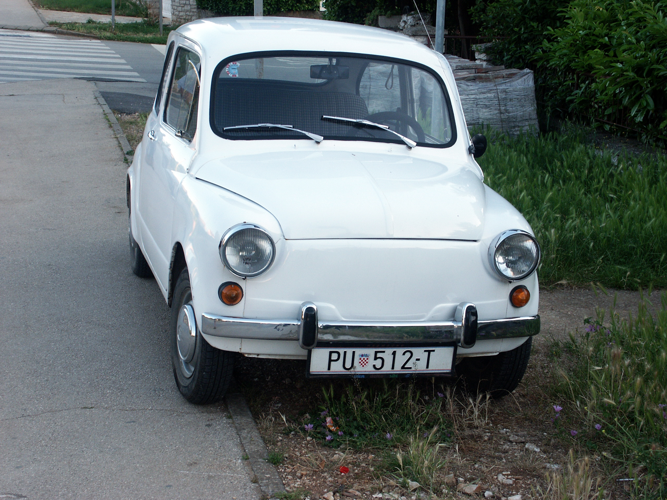 Zastava 750 (Застава 750). Author: xalax Pula, 2004 Zastava